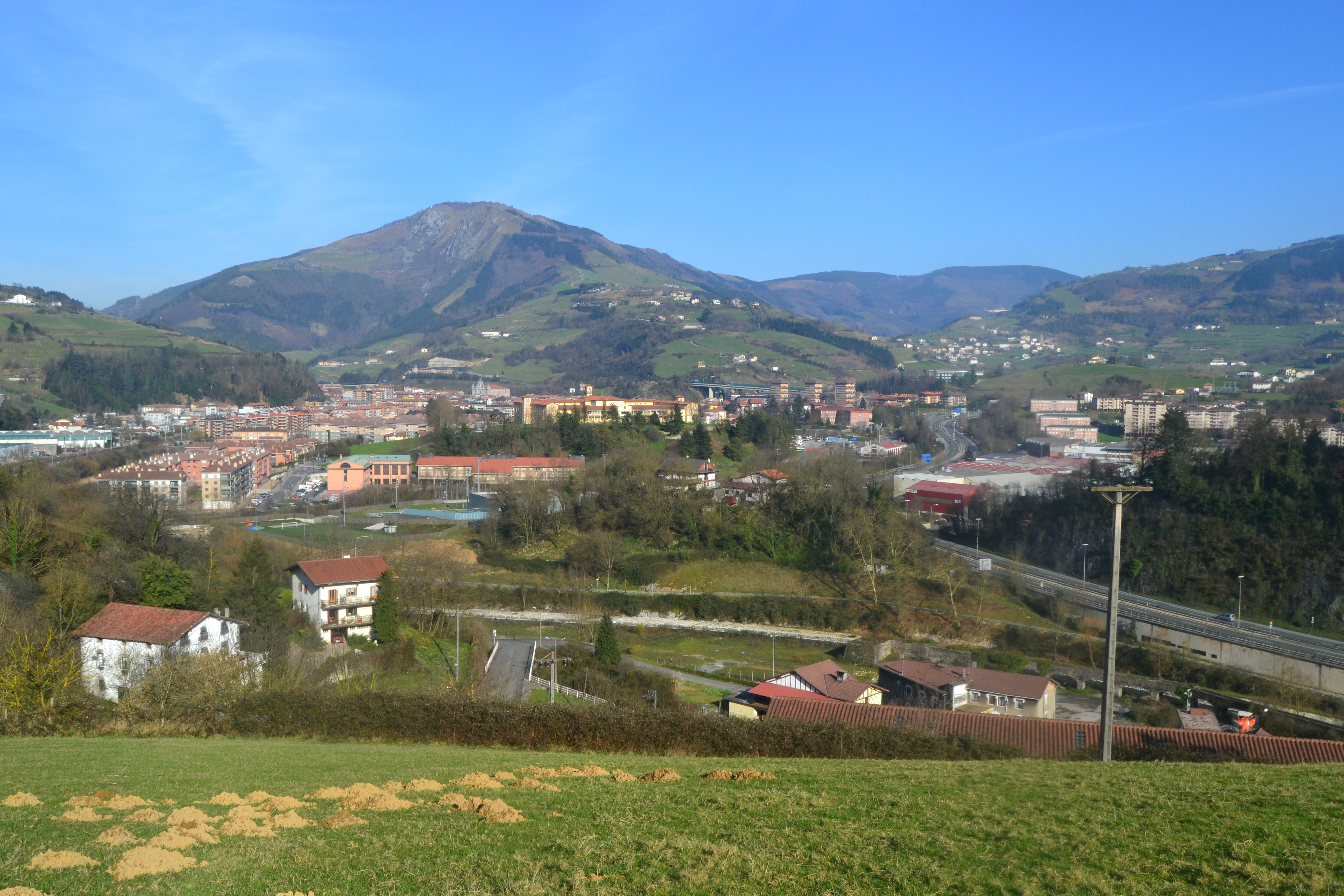 Tolosa. Gipuzkoa, Euskal Herria. Tolosa. Gipuzkoa, Basque Country.